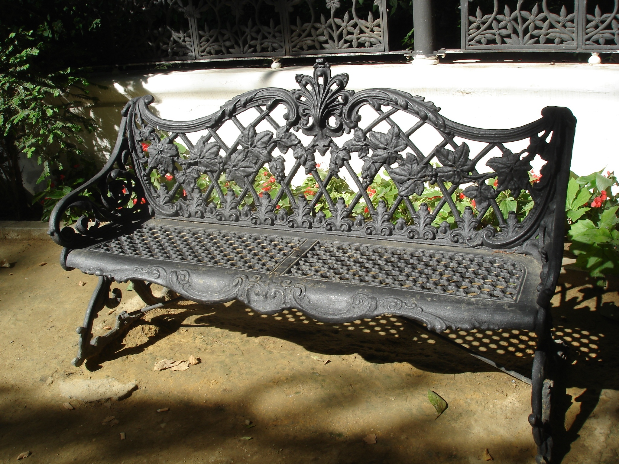 Bancă metalică fotografiată în 2009 la Sevilla, Spania